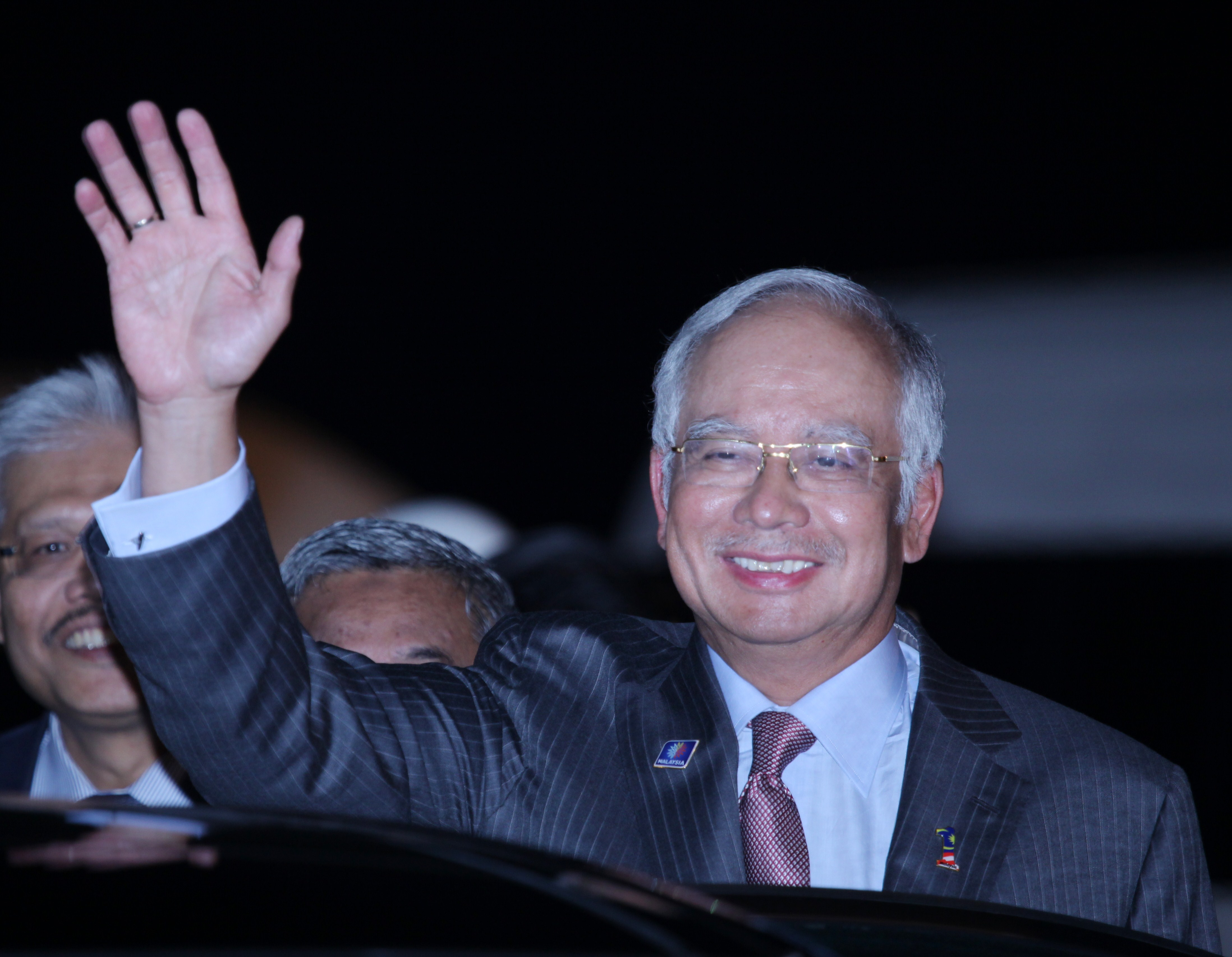 6 Oktober 2013 Perdana Menteri Malaysia Najib Razak tiba di Bali dalam rangka KTT APEC 2013 di Bali, Indonesia.